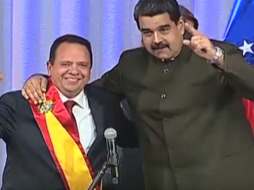 Nicolás Maduro en la toma de posesión de Rodolfo Marco Torres como Gobernador de Aragua